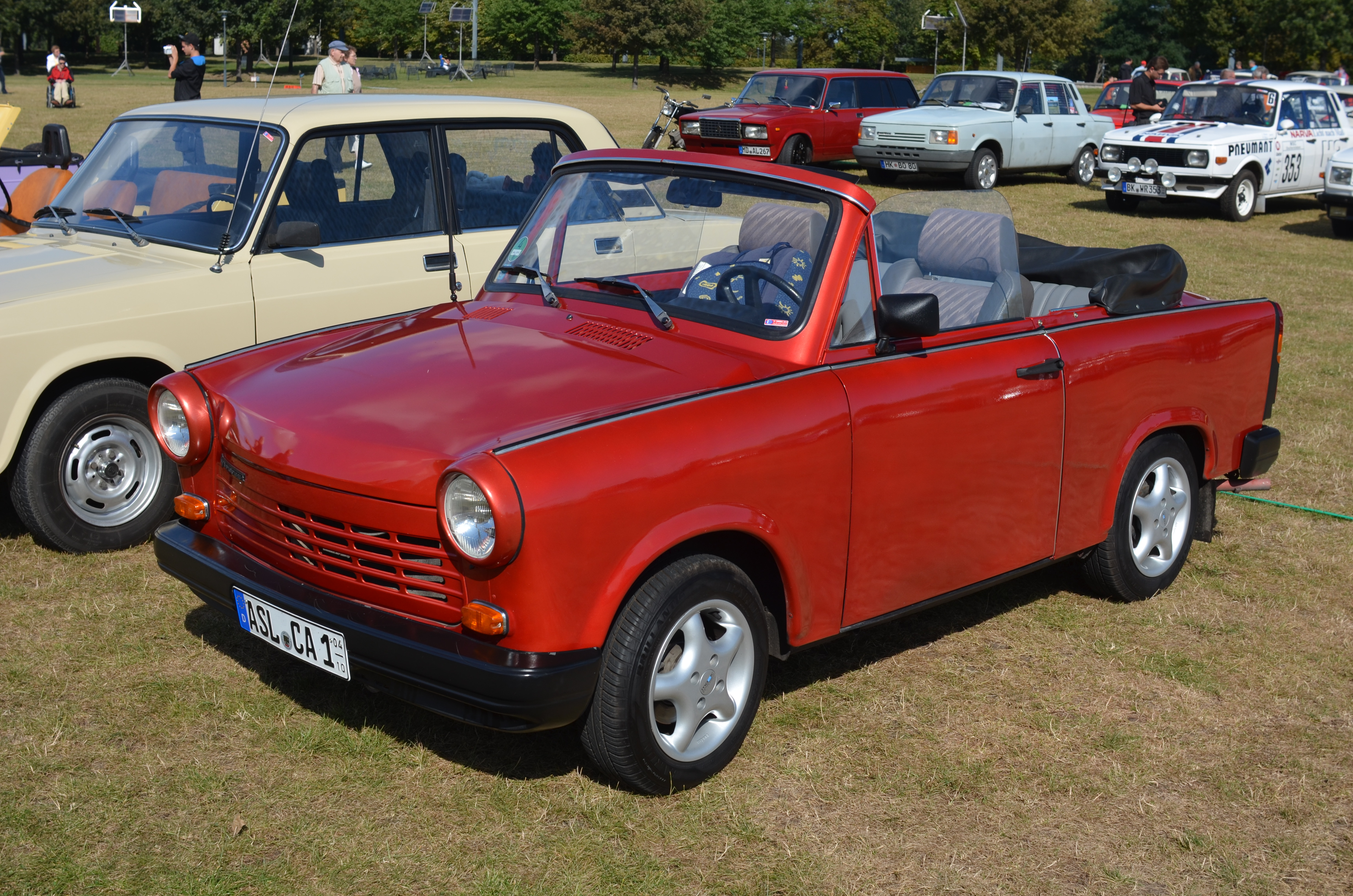 Trabant